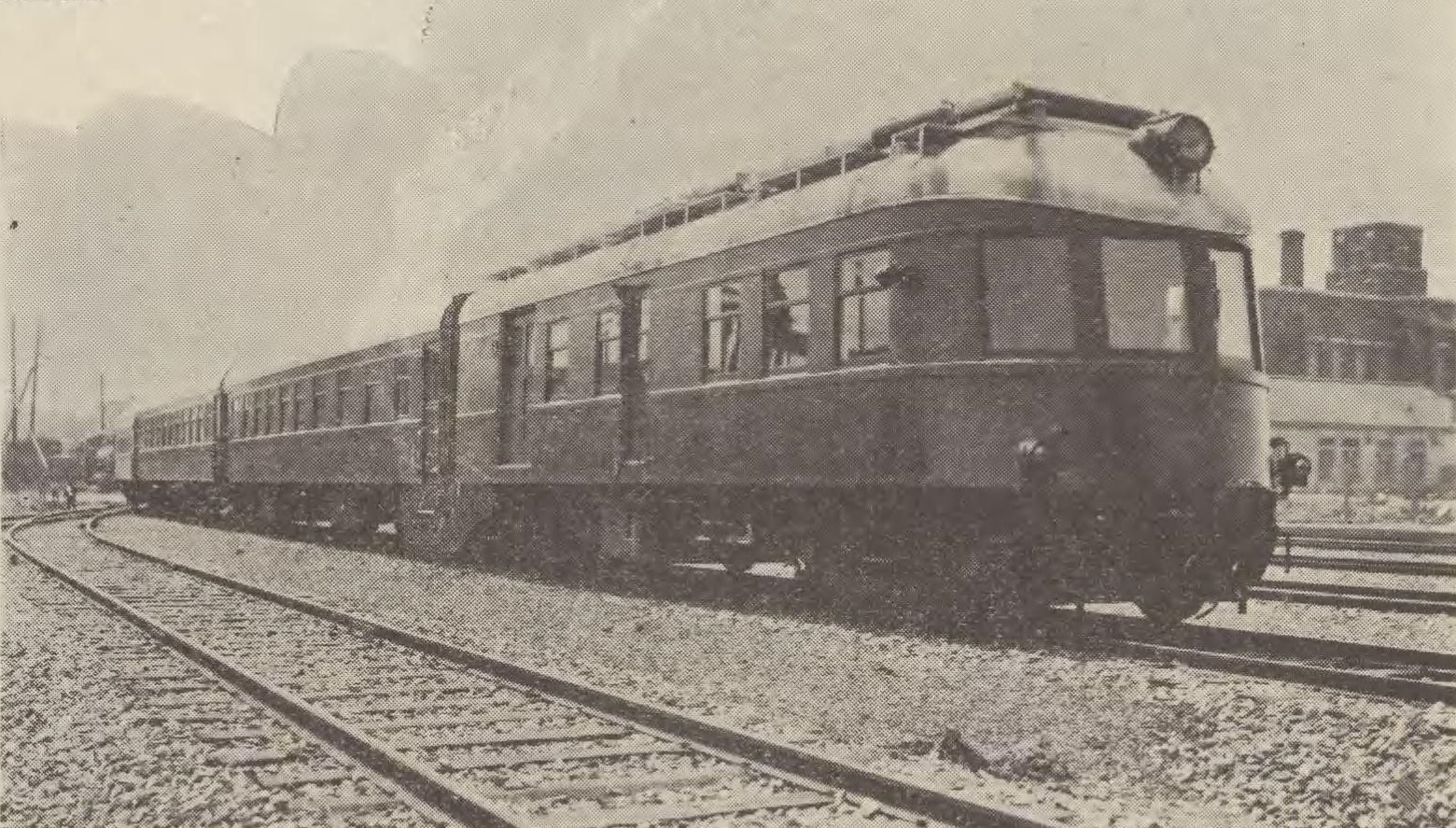 南満州鉄道ジテ形気動車。